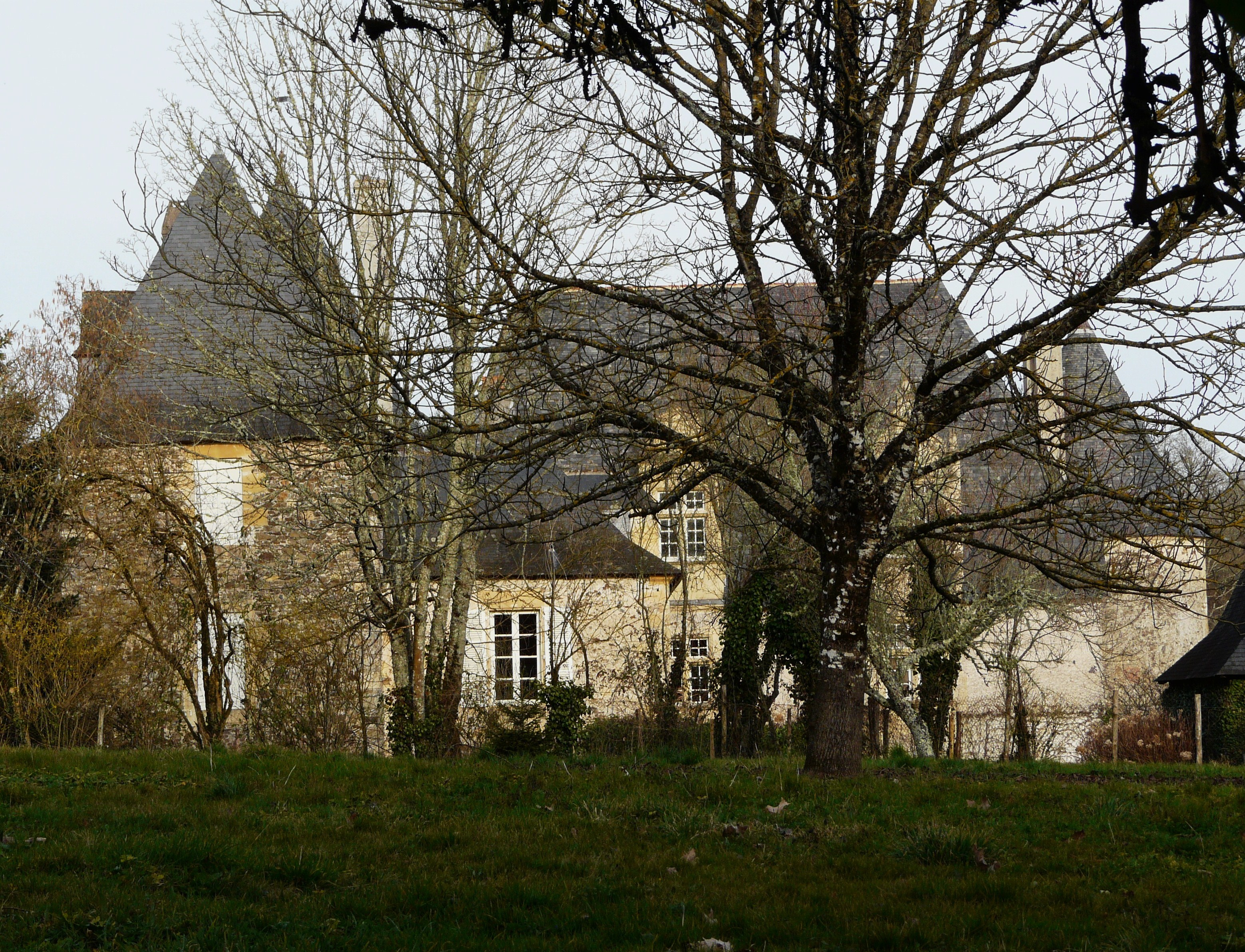 Le château de la Forge, Savignac-Lédrier, Dordogne, France